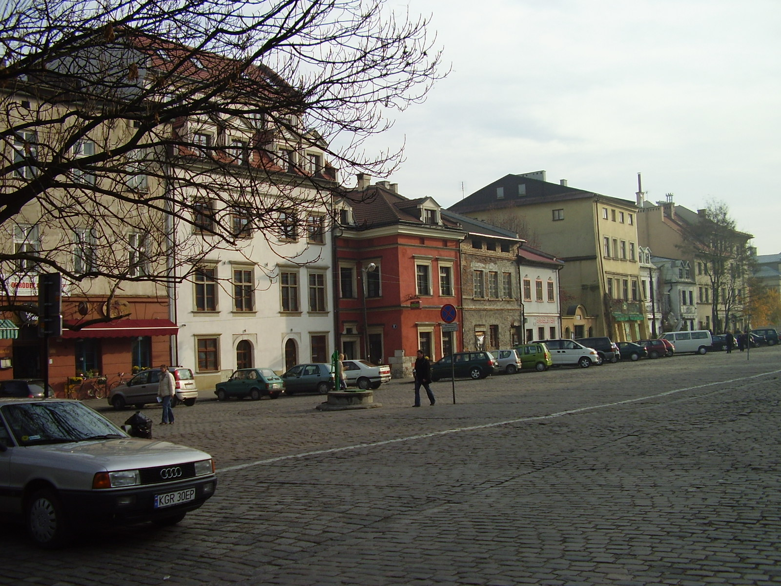 Krakow